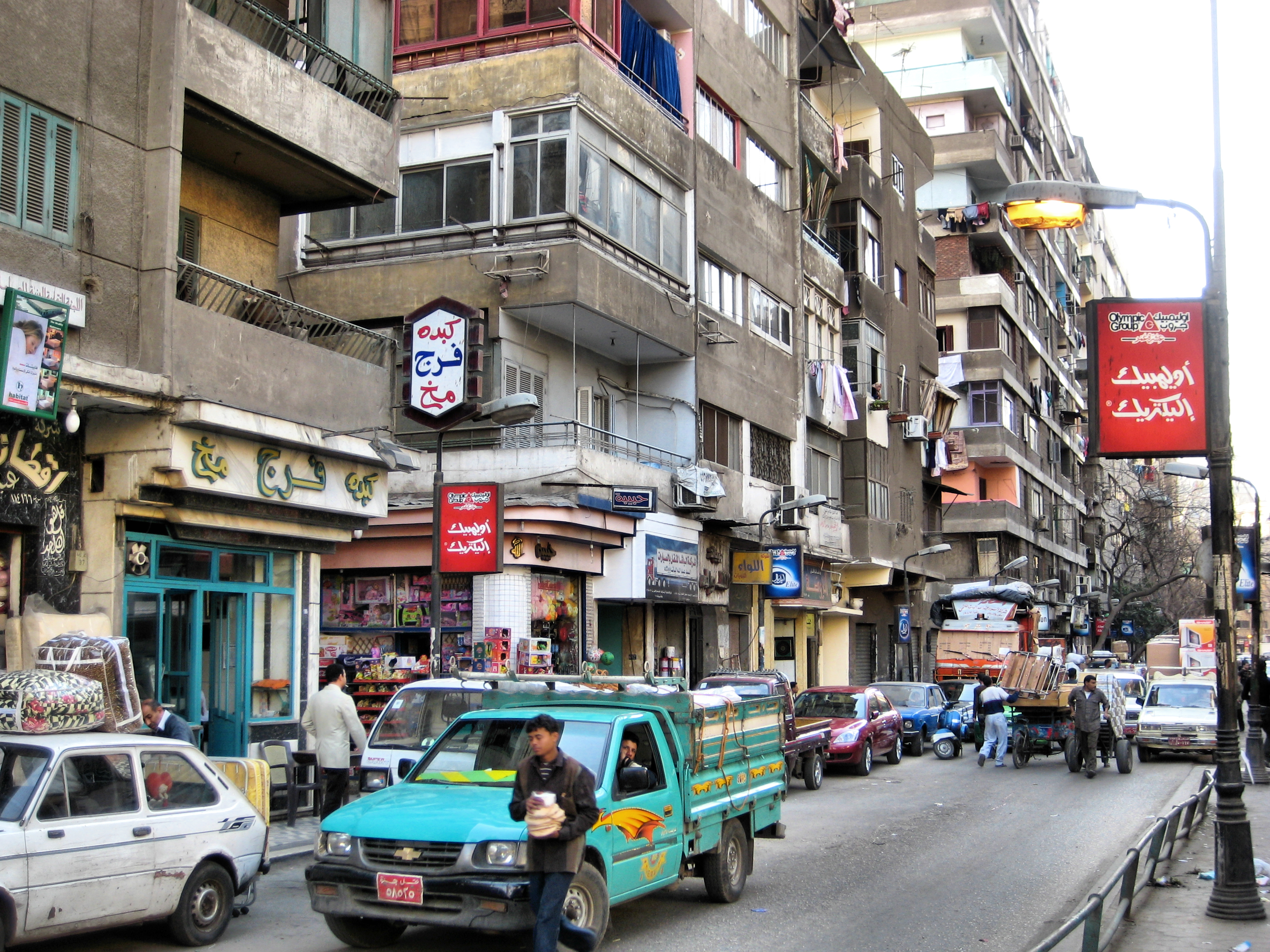 Central Cairo